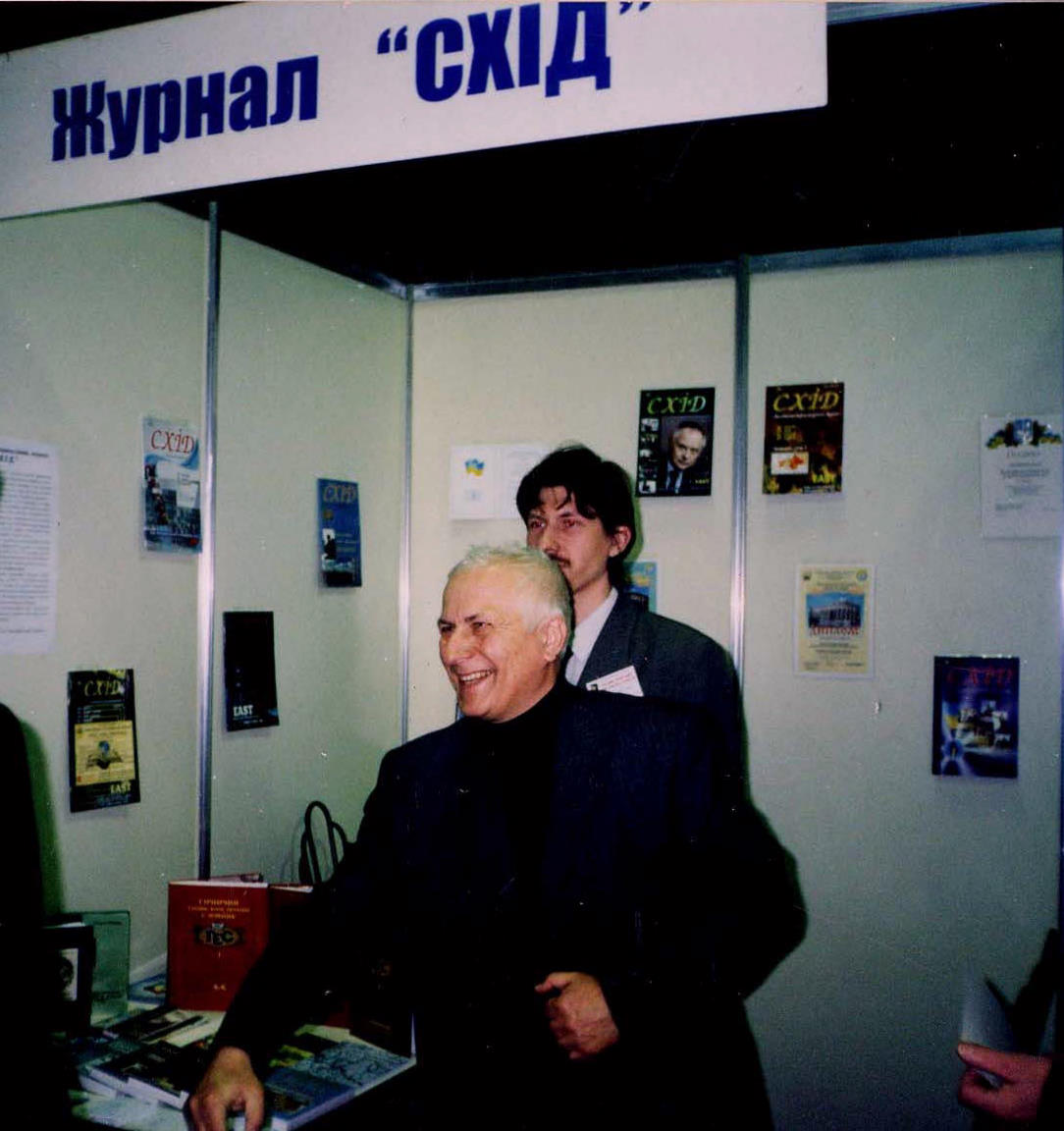 На виставці книг у Донецьку.Презентація журналу "Схід" у виставковому центрі "Донецьк-ЕКСПО" (на передньому плані Білецький Володимир Стефанович)